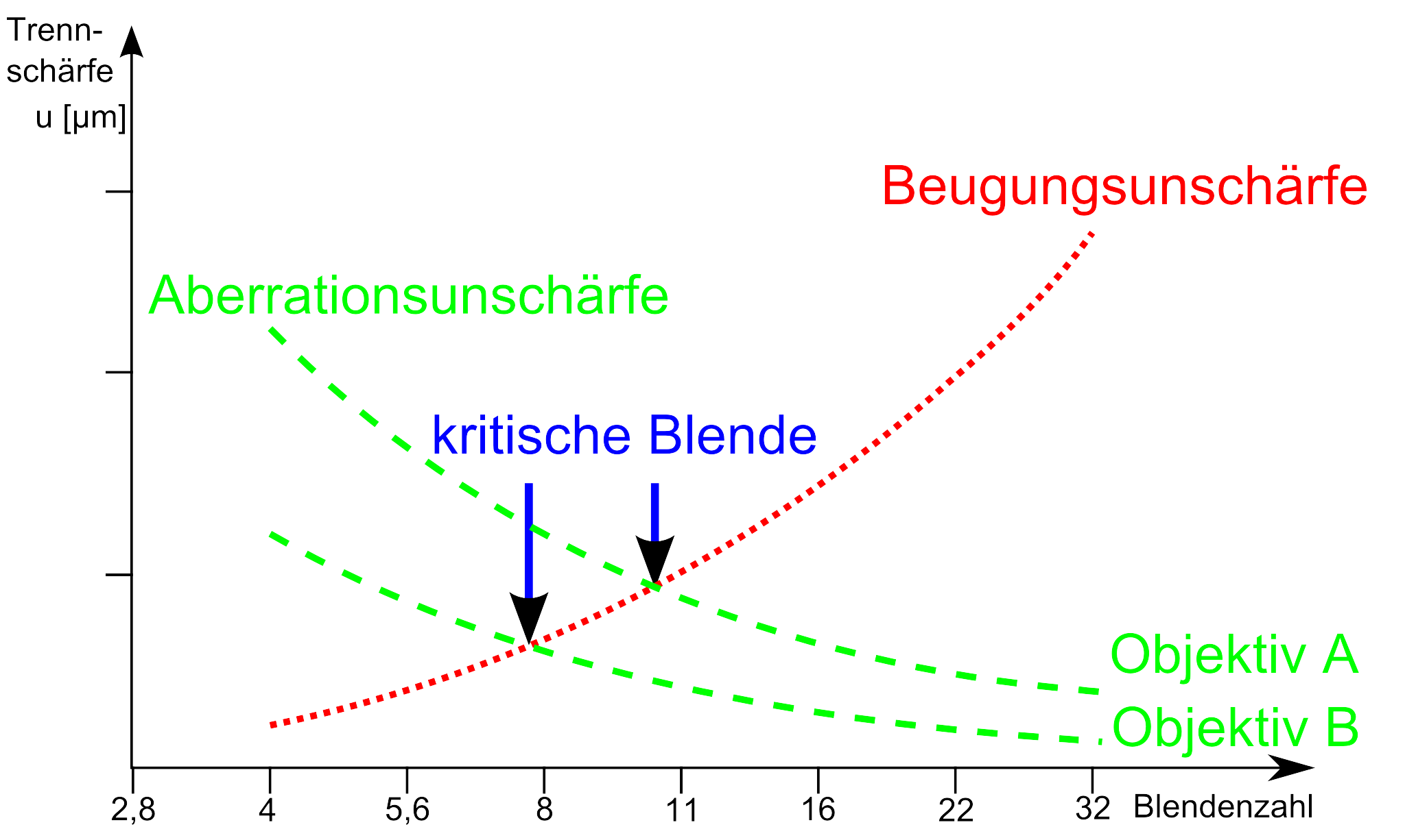 Darstellung der kritischen Blende als Kompromiss aus Aberrationsunschärfe und Beugungsunschärfe eines Objektives